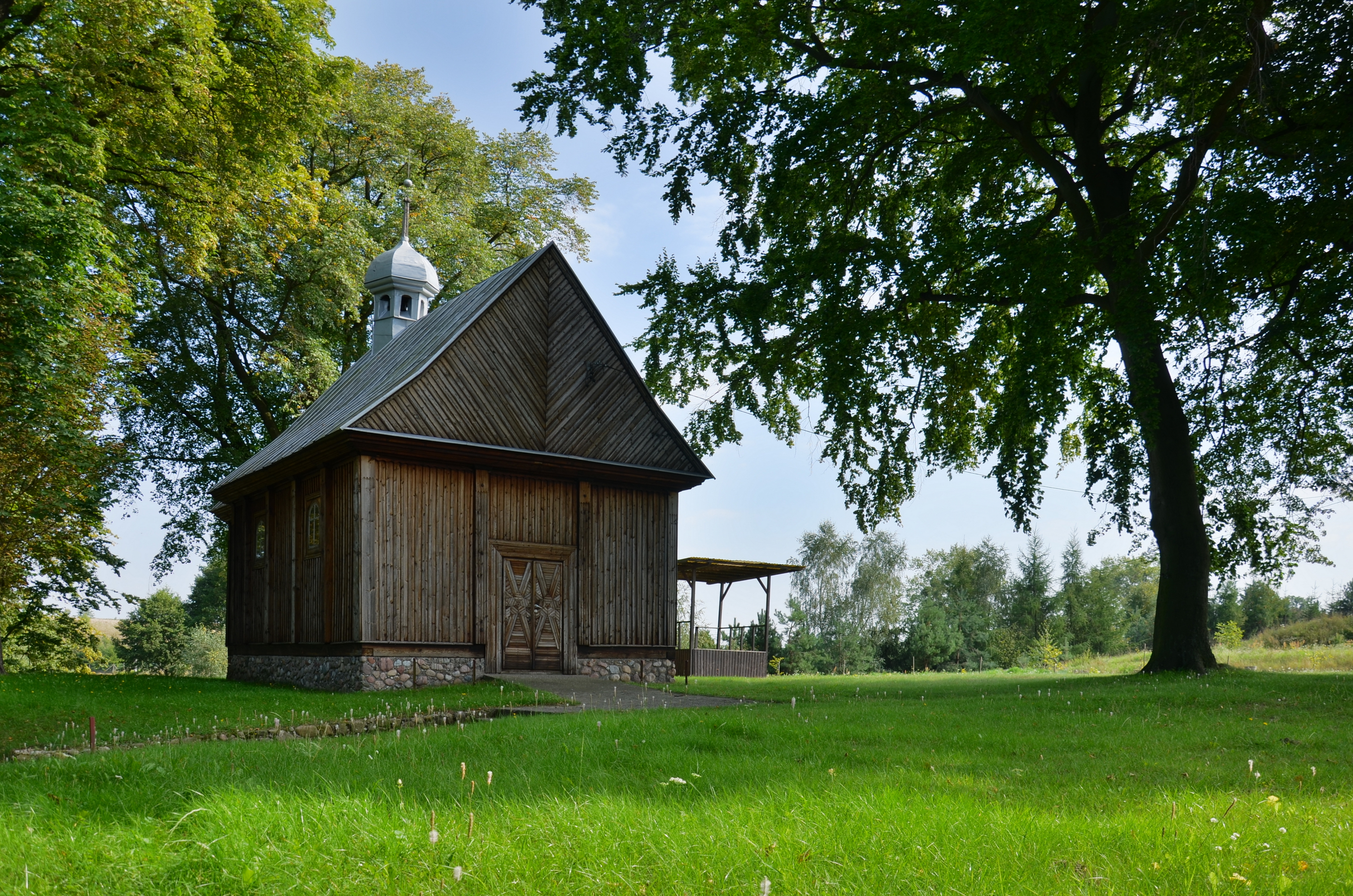 Studzianka, część wsi Kleszczyn, kaplica pw. Matki Boskiej Studziennej, 1704